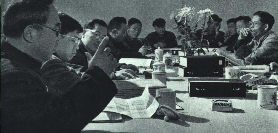 1964-01 1964年 曲阜师范学院